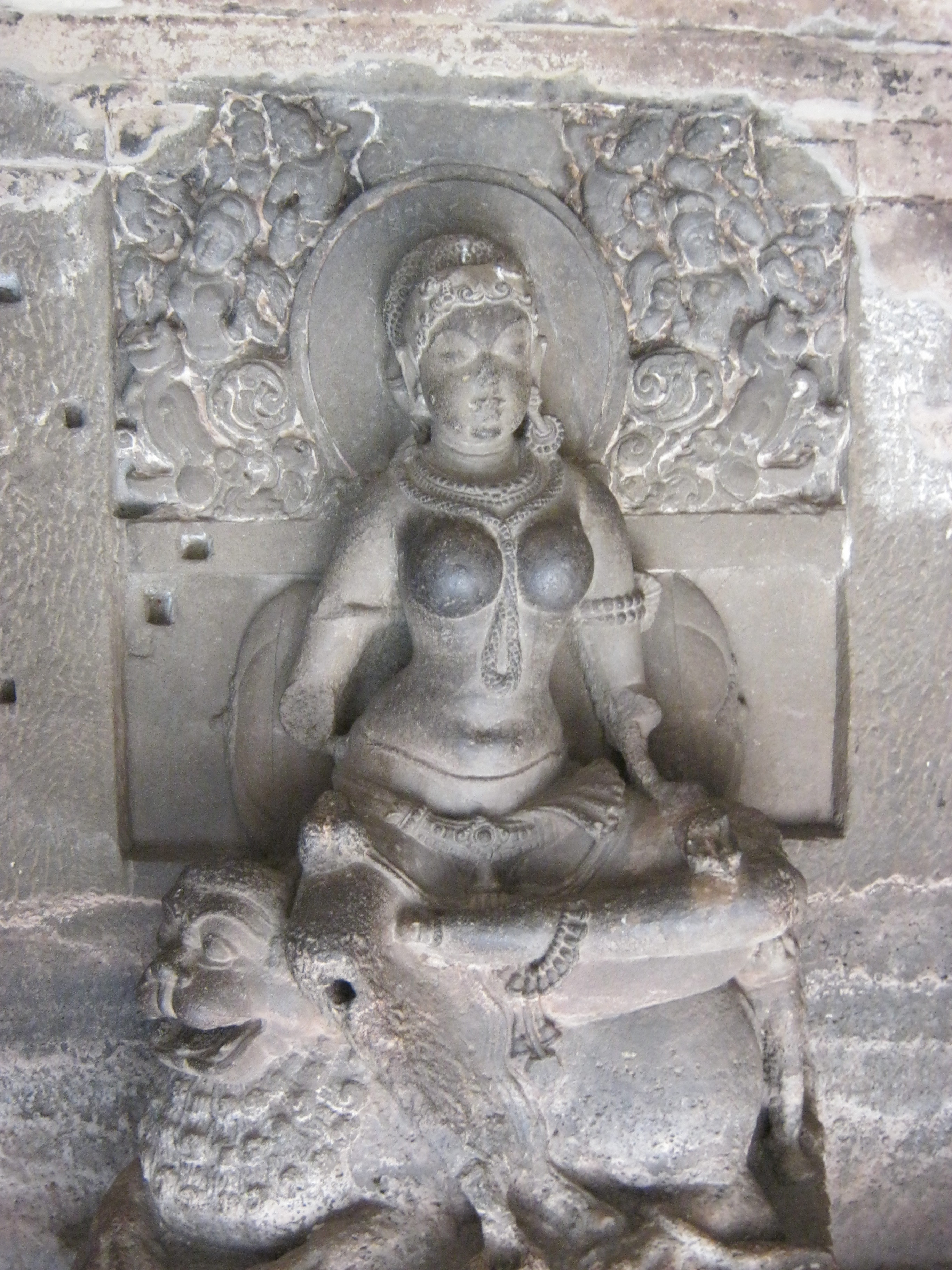 அம்மை, கொற்றவை, ஆலமர் செல்வி, ஆலமர் செல்வன் மனைவி, எல்லோரா குடைவரைச் சிற்பம்.